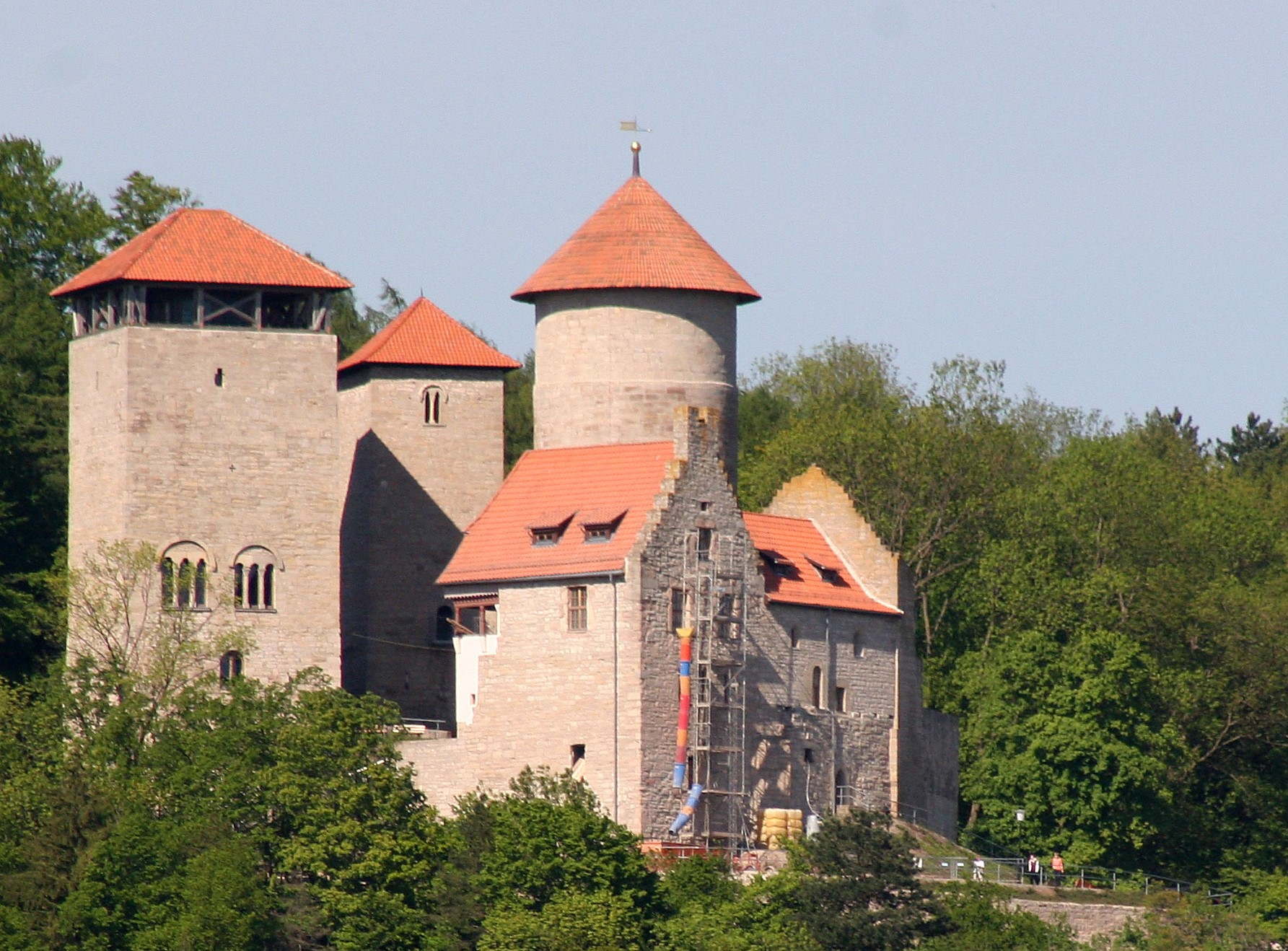 Burg Normannstein Treffurt Südansicht